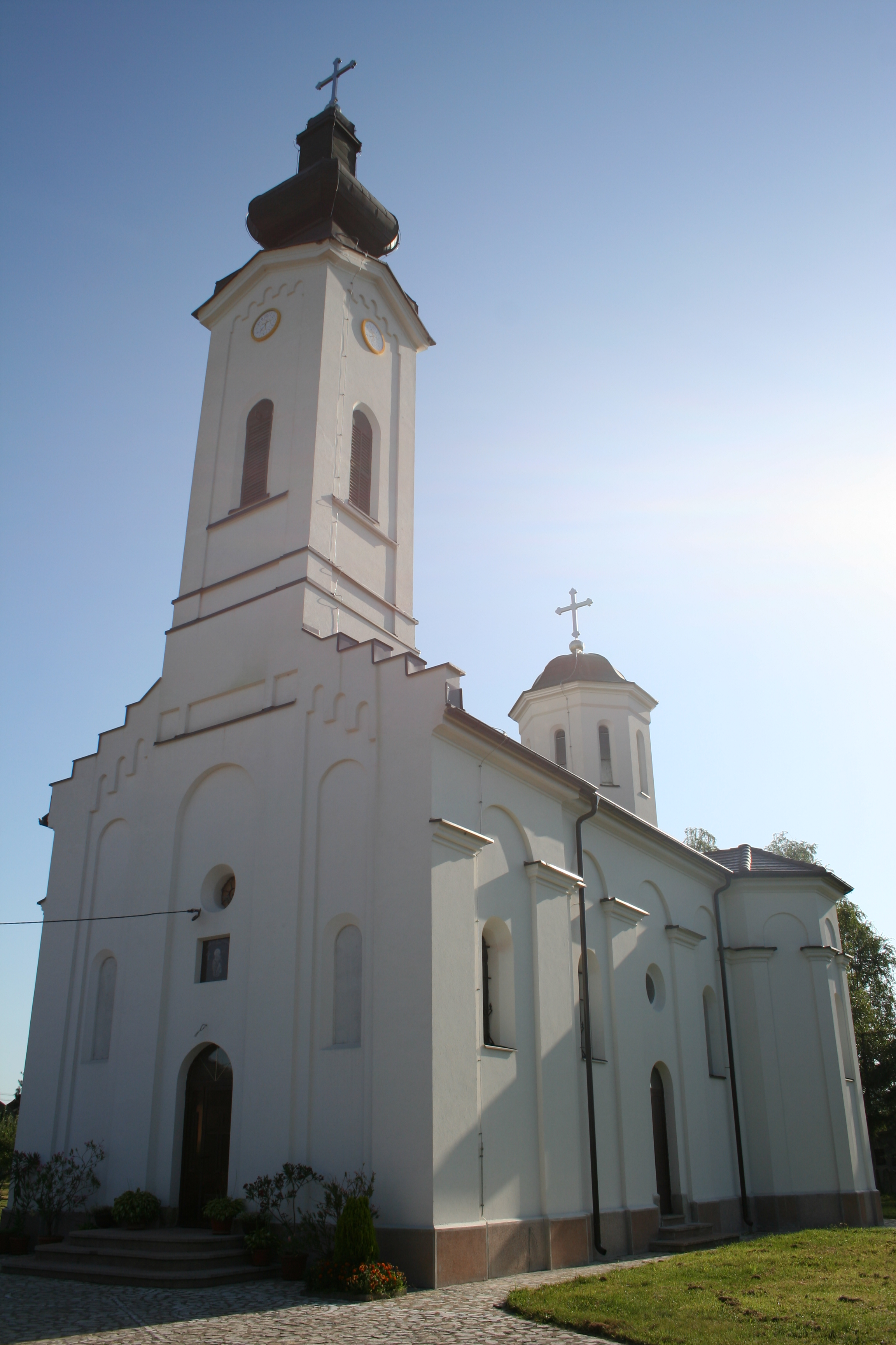 Crkva Sv. Ilije, Jadranska Lešnica